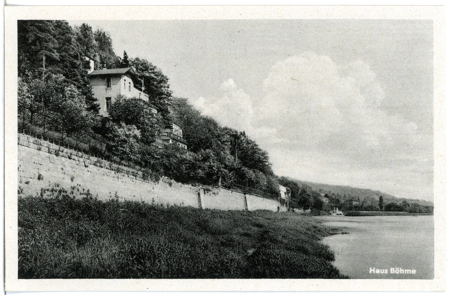 Dresden; Haus Böhme, Körnerweg 26 in Loschwitz This postcard is from publisher Brück & Sohn in Meißen ( postcard has a unique number 27583 and is available in a higher resolution at the publisher. This images was uploaded in a cooperation project between Wikipedians and the publisher.